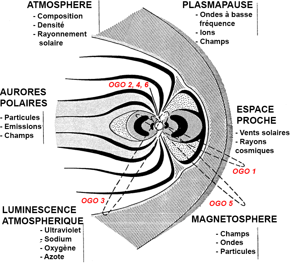 Objectifs et orbite des satellites Orbiting-Geophysical-Observatory (libellés en francais)